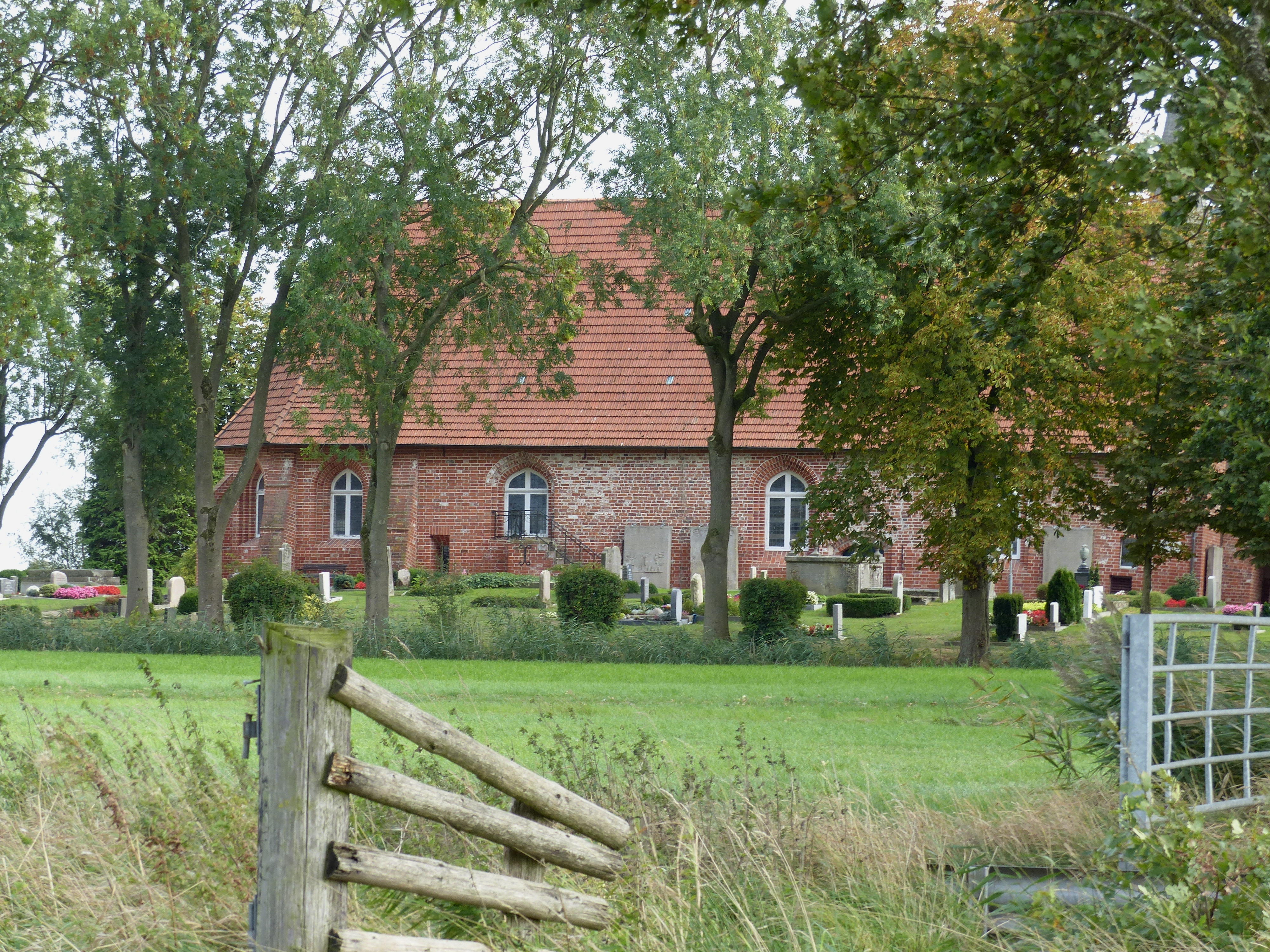 Strückhauser Kirche von Norden